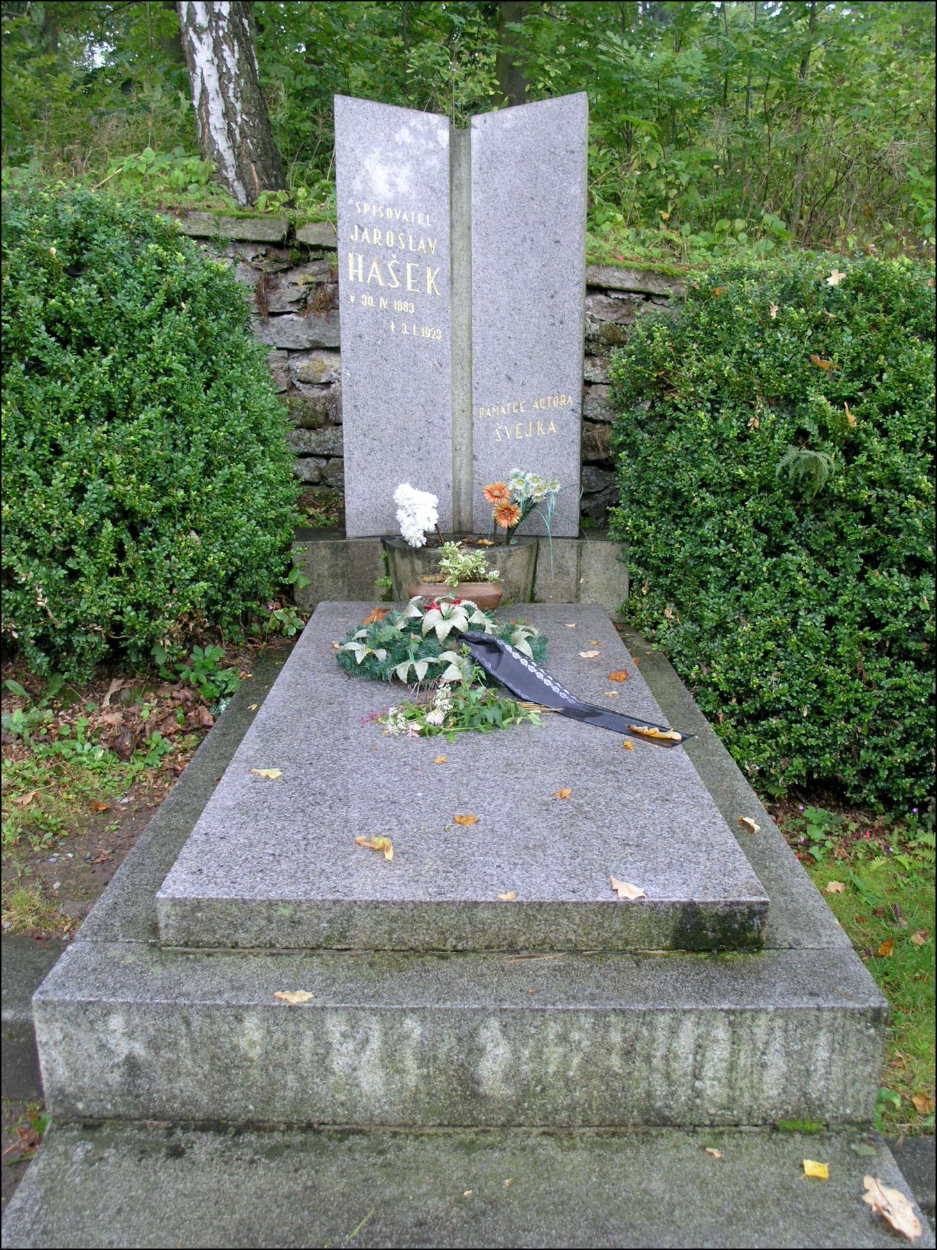 Lipnice nad Sázavou - grave of Jaroslav Hašek